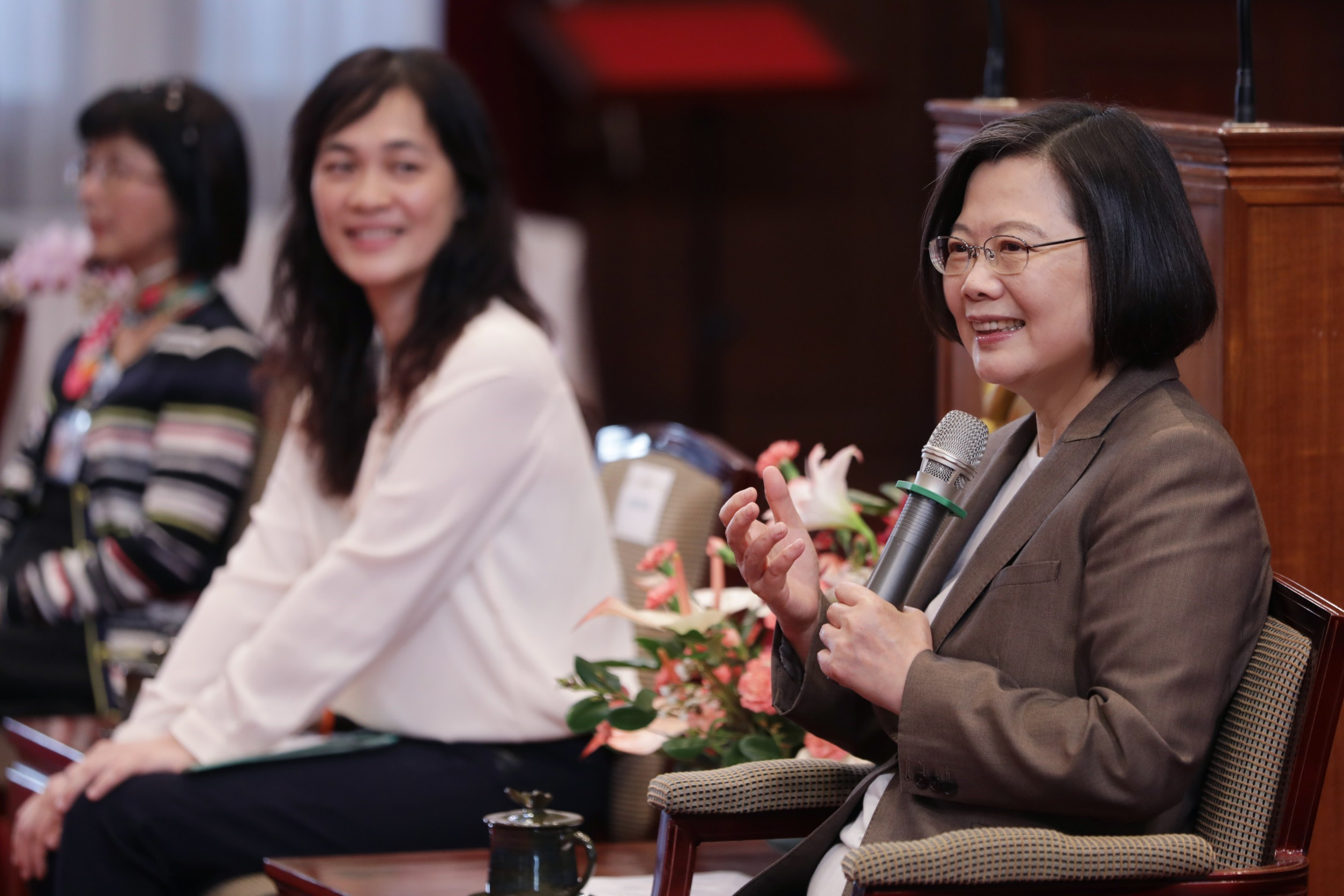 20200327 總統接見「防疫醫護人員」 中華民國109年03月27日 蔡英文總統今（27）日上午接見「防疫醫護人員」，感謝所有防疫夥伴的無私奉獻、盡心盡力；這場戰役還沒有結束，政府也不會鬆懈，請所有防疫醫護人員務必為國珍重，跟全體臺灣人民一起奮戰，守住疫情，守住臺灣人民的健康。 總統致詞時表示，在這波疫情挑戰中，我們的醫護人員擔任起重責大任。大家執行防疫專案任務，包括寶瓶星號的檢疫，前往日本進行鑽石公主號的接機檢疫、還有分別前往成都、武漢，接回血友病母子和國人同胞，都是社會大眾非常關注的事件。 總統指出，不只是大眾關注的事件，在每一間醫療院所，每一個看得見或看不見的角落，所有醫護人員都犧牲了休假、犧牲了和家人相處的時光，只為了一個共同的目標，也就是我們要守住疫情，守住臺灣人民的健康。 總統進一步指出，每一項任務都很艱辛，而完成每一項任務，都是臺灣防疫實力的表現，也更受到肯定。無論是檢疫的高效率，或是病患的收治，都做到滴水不漏，大家的努力以及傑出的表現，都是有目共睹。 總統說，她相信很多國人，都可以透過新聞感受到，醫護人員在執行任務的時候，必須長時間穿著全套的防護裝備，不能吃喝、不能上洗手間。大家即使喉嚨再乾痛、身體再悶熱，甚至呼吸不順，也要全神貫注，確保每一個步驟都沒有疏漏。在任務結束後，臉上都是口罩的壓痕，真的非常辛苦。 總統表示，今天，她要代表國家謝謝大家的辛勞。「謝謝你們，在國家最需要你們的時候，義無反顧」。也感謝衛福部陳時中部長，日以繼夜指揮調度。先前，對於醫福會王必勝執行長率領的武漢包機醫護團隊，陳部長結合病名和武漢的簡稱，給了一個封號，叫做「1954義勇軍」。 總統提到，很多網友一開始猜測「1954」，是指「依舊無私」，象徵我們臺灣醫護人員的無私奉獻，這也非常貼切。今天現場的每一位，都是無私奉獻、盡心盡力，都是臺灣的防疫英雄。 總統也說，不只是各位，在這段時間，無論在公私立醫院，每一位努力投入防疫最前線的朋友，無論是醫師、護理師、或者是非常辛苦、每天負責篩檢、檢驗的醫檢師，甚至醫療院所的保全人員，在指揮中心的調度領導下，都投入百分之一百二十的力量，來保護臺灣人民的健康權利。 總統也提到，國際輿論都說臺灣表現得不錯，事實上，臺灣不錯，是因為有大家。無論是在場、或者不在場的防疫夥伴，她要代表國家感謝大家，臺灣之所以能夠在紛亂的疫情中，團結成一個共同體，正是因為全體醫護人員的努力付出。 總統強調，防疫如同作戰，要因應局勢快速行動。這週，我們推出了新一波針對個人、家庭、企業和產業的加碼紓困方案，來降低疫情的衝擊。大家在努力，政府也不會鬆懈，我們整個政府團隊都動起來，做國人最堅強的後盾。 總統談到，有些網友說防疫要「順時中」，她認為，時鐘可以順著走，而且走得順，是因為所有夥伴都堅守在崗位上。她要再一次謝謝大家，也要拜託大家，這場戰役還沒有結束，請大家務必為國珍重，跟全體臺灣人民一起奮戰，「臺灣需要各位，總統也向各位拜託了」。 訪賓一行由衛福部長陳時中陪同，前來總統府晉見總統，總統府秘書長陳菊也在座。